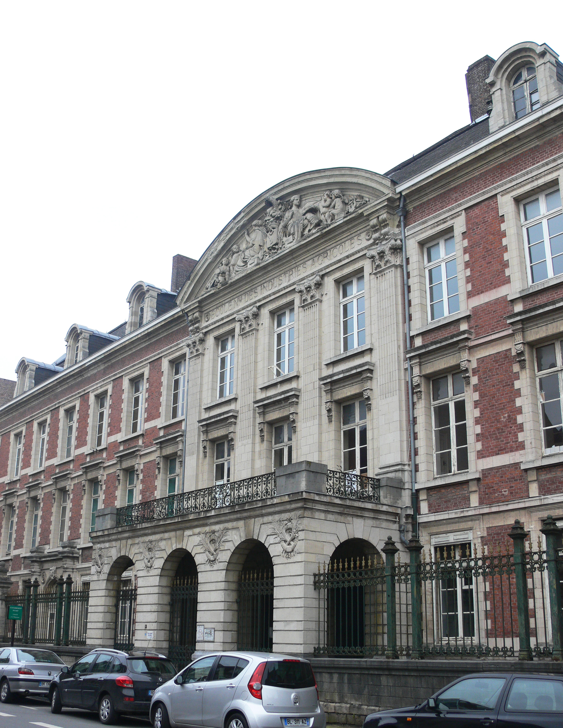 Douai - lycée agricole de Douai-Wagnonville - façade